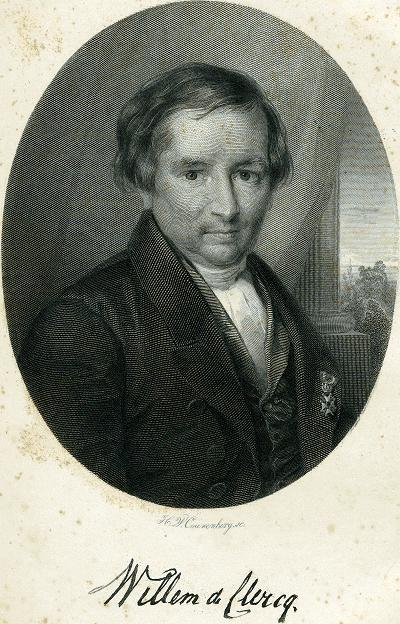 Willem de Clerq (1795-1844)